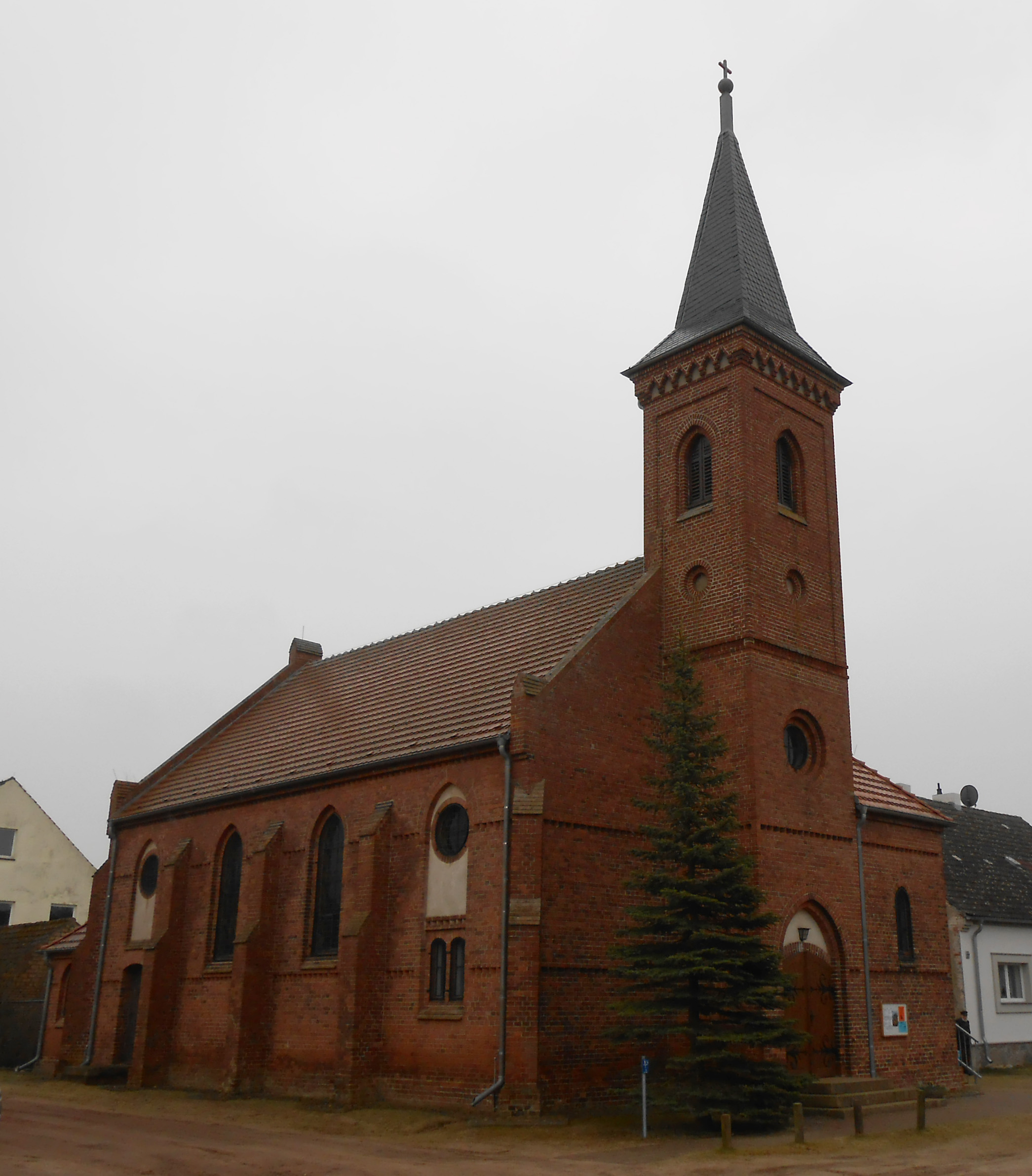 Dorfkirche von Kurtschlag